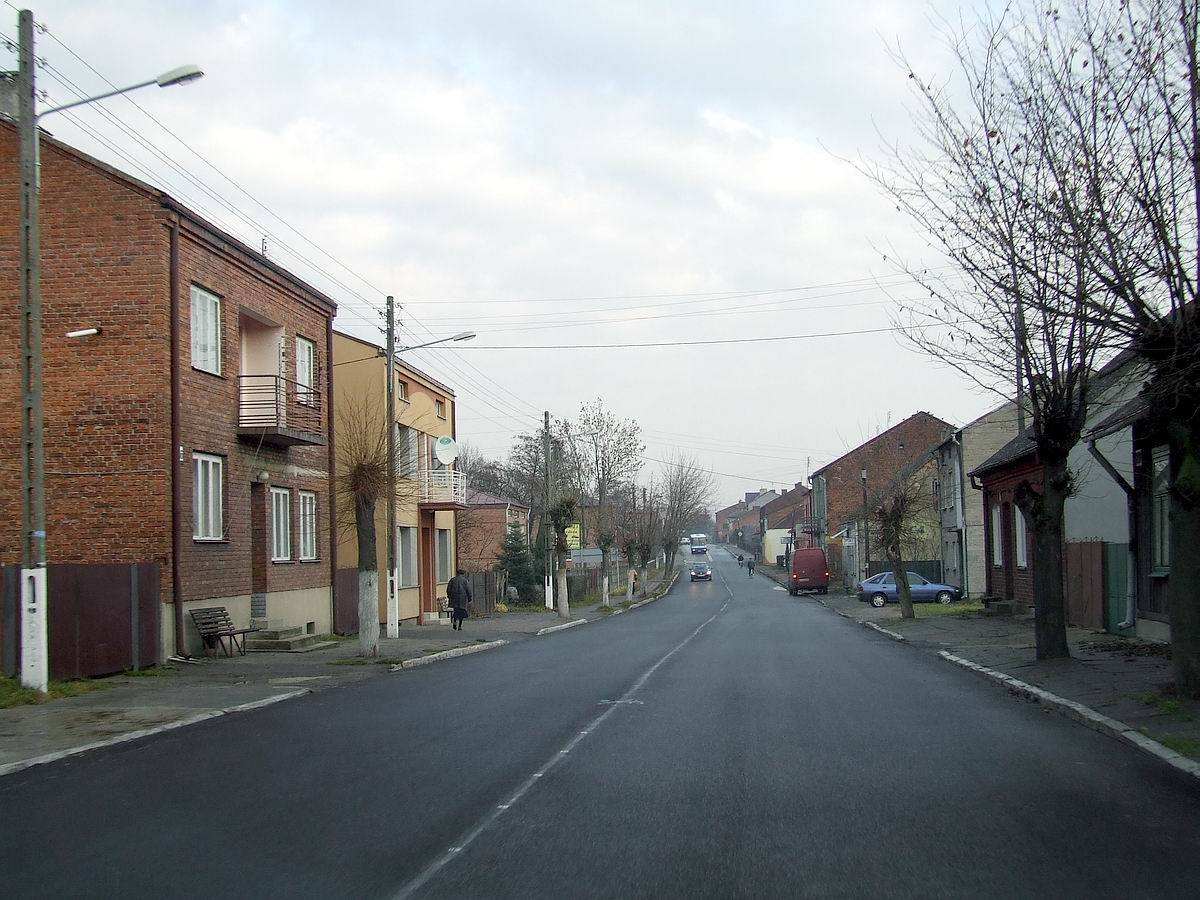 Nowa Brzeźnica, woj. łódzkie, droga krajowa Kluczbork-Radomsko